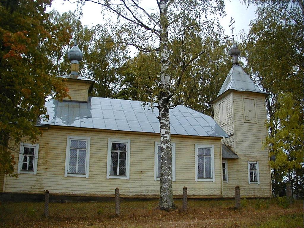 Rugāju pareizticīgo baznīca 2002-09-14